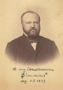 Fotografie von Adolf Ernst von Ernsthausen